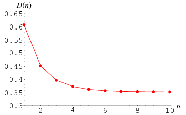 D(n) Konstante